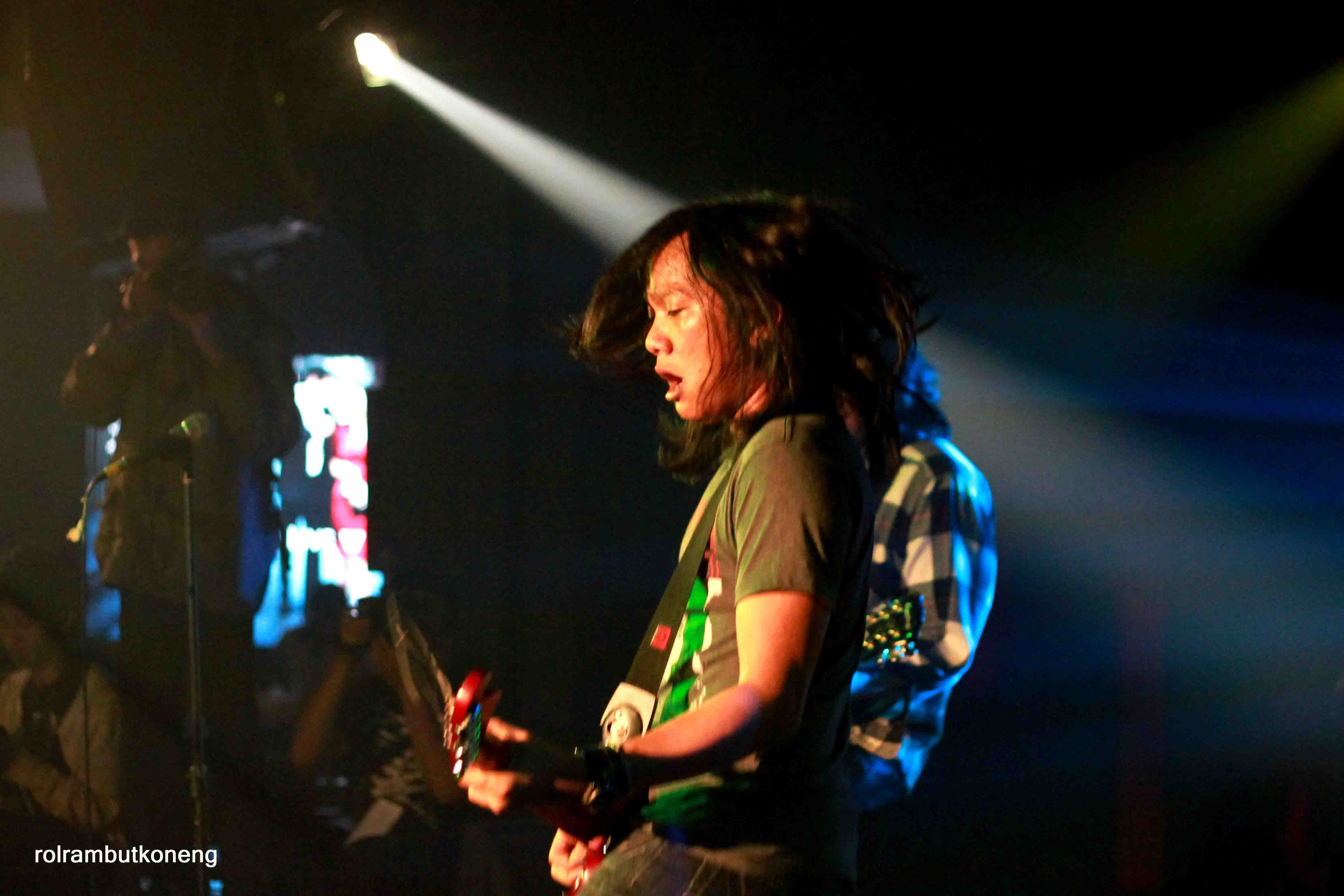 Pheps dalam suatu konser di Bandung